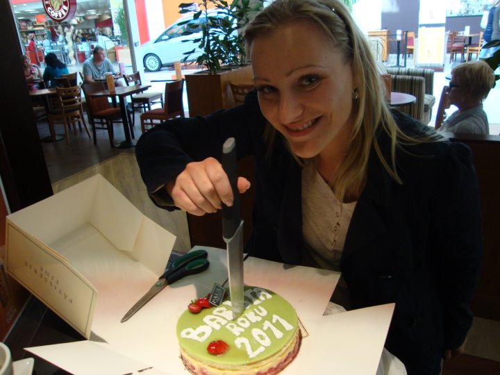 Baristka roku 2011, Denisa Karešová z Teplic.